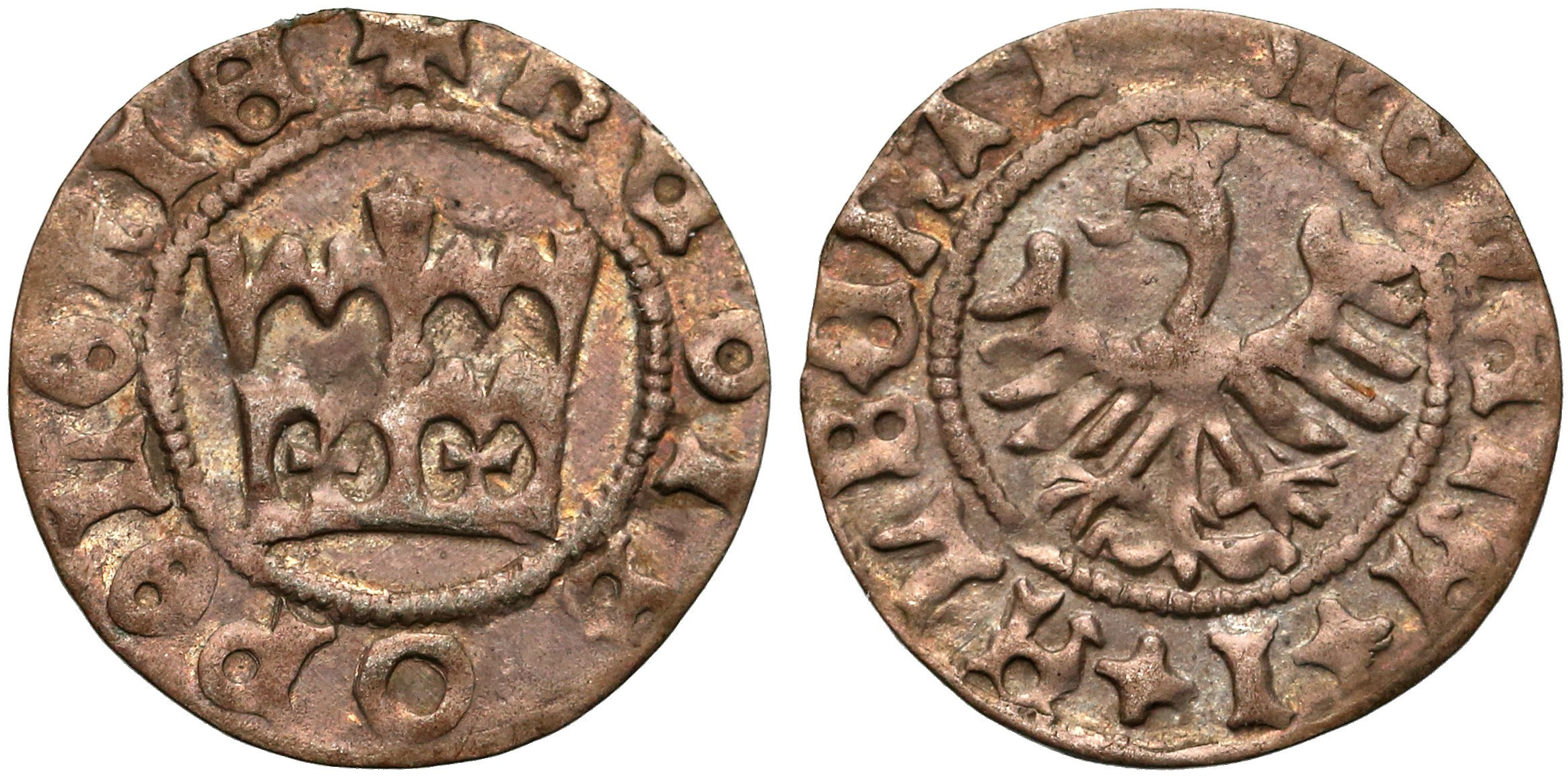 Półgrosz koronny Jan Olbracht Kraków